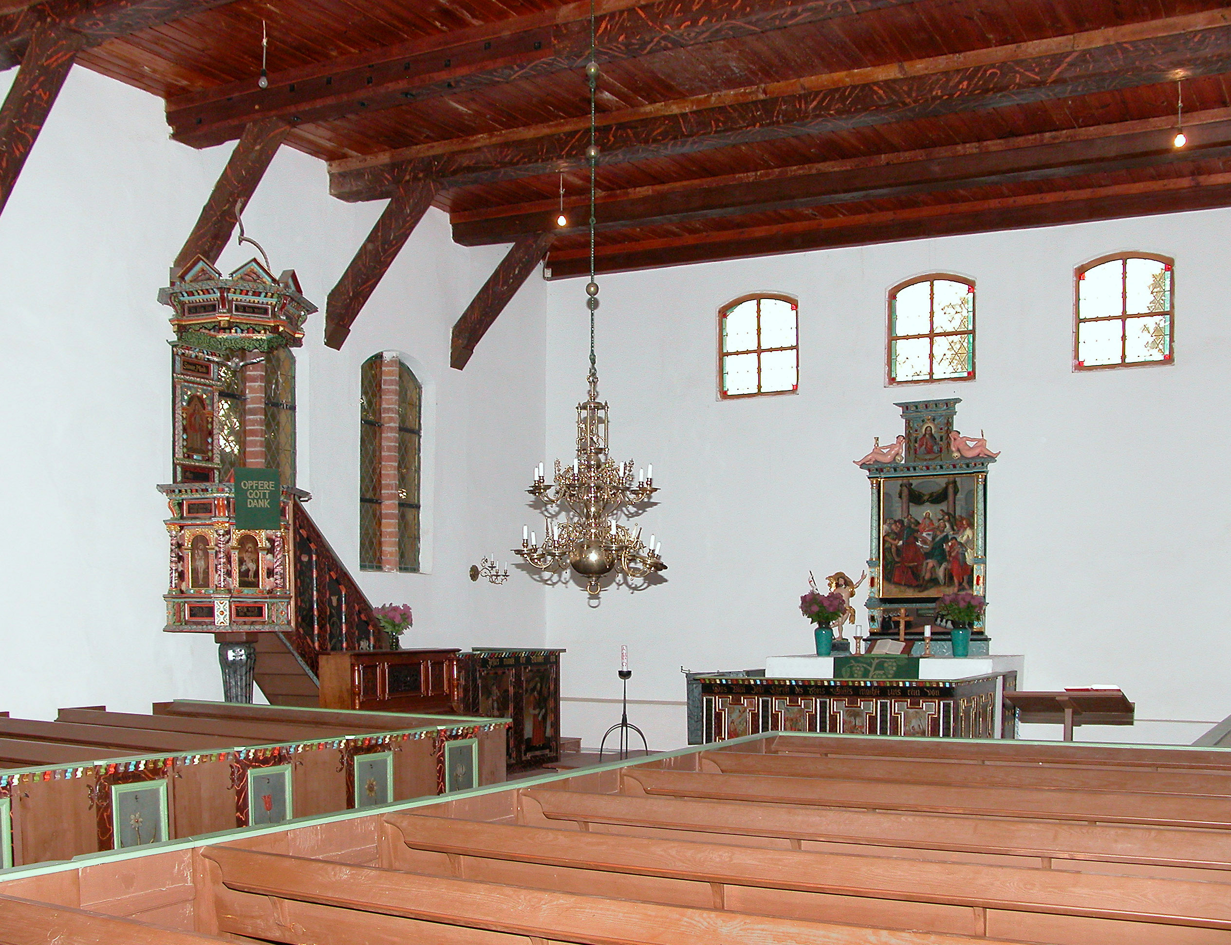 01.07.2004 17406 Mönchow (Usedom), Mönchow 15A (GMP: 53.843691,13.871520): Dorfkirche aus der 2. Hälfte des 15. Jahrhunderts. Ausstattung 17. Jh. [DSCN4581.JPG]20040701040DR.JPG(c)Blobelt